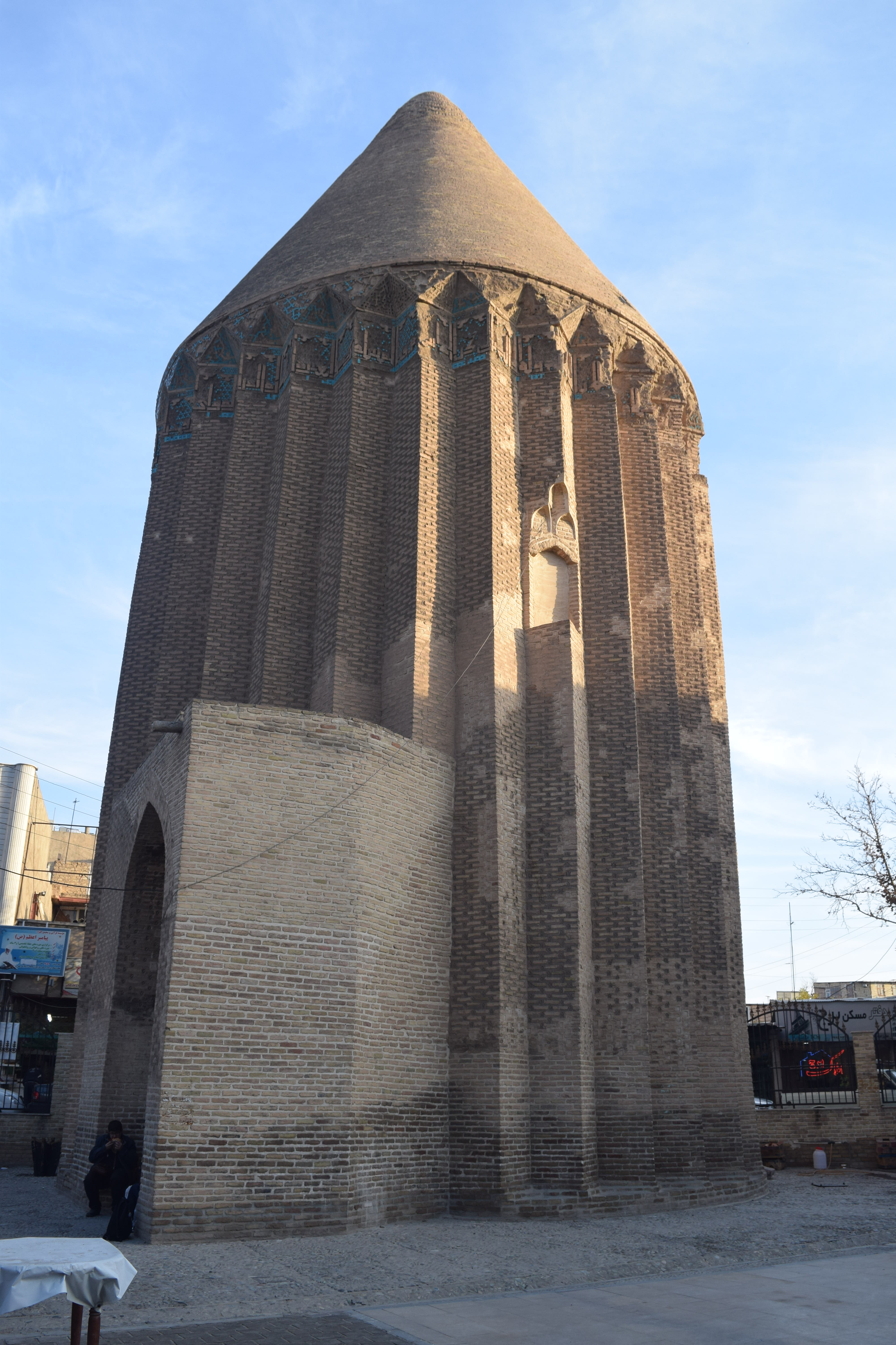 نمایی از برج علا‌الدوله ورامین